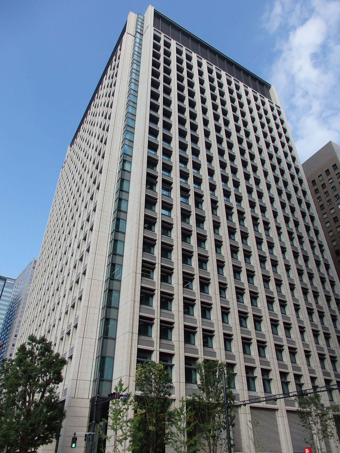 大手門タワー・JXビル